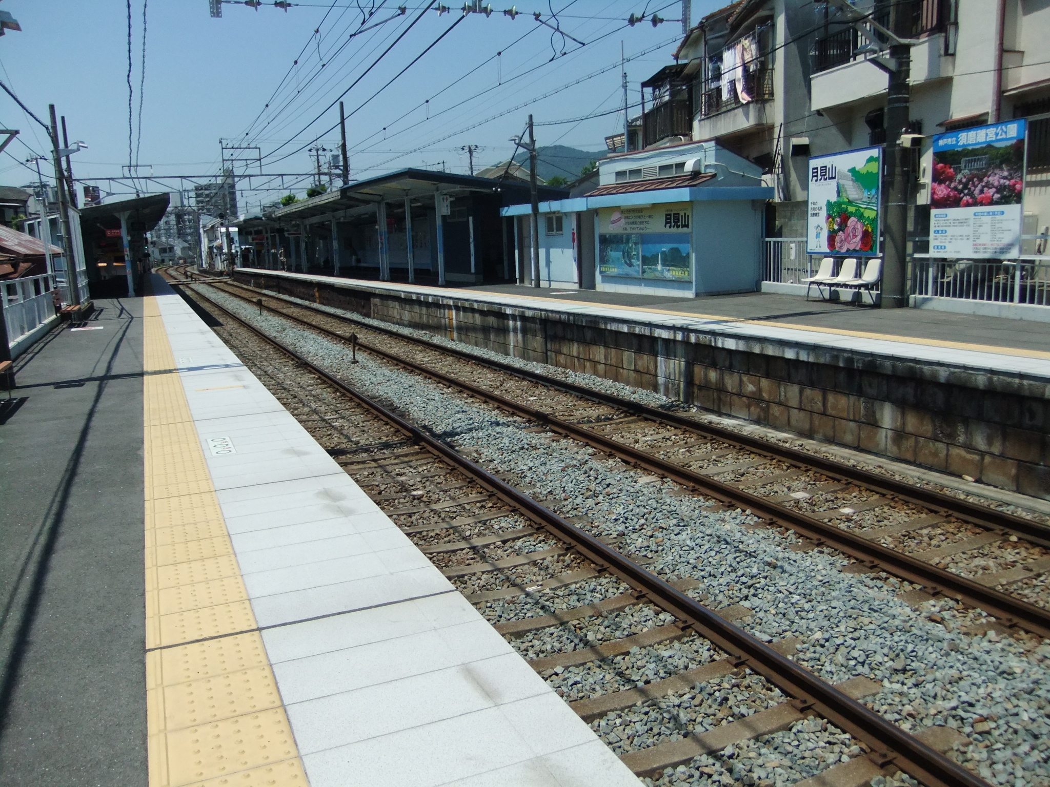 月見山駅ホーム